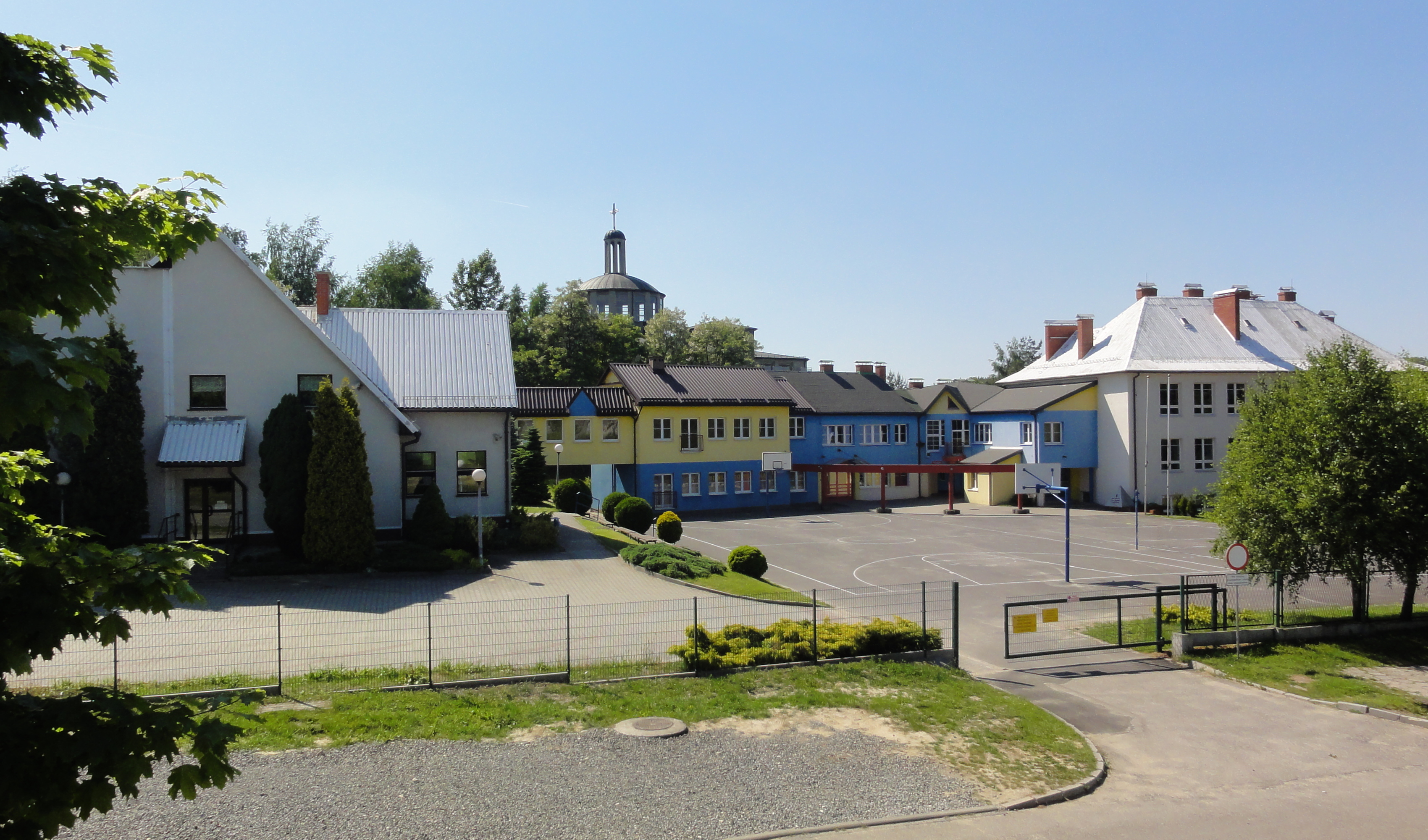 Warszowice Szkoła